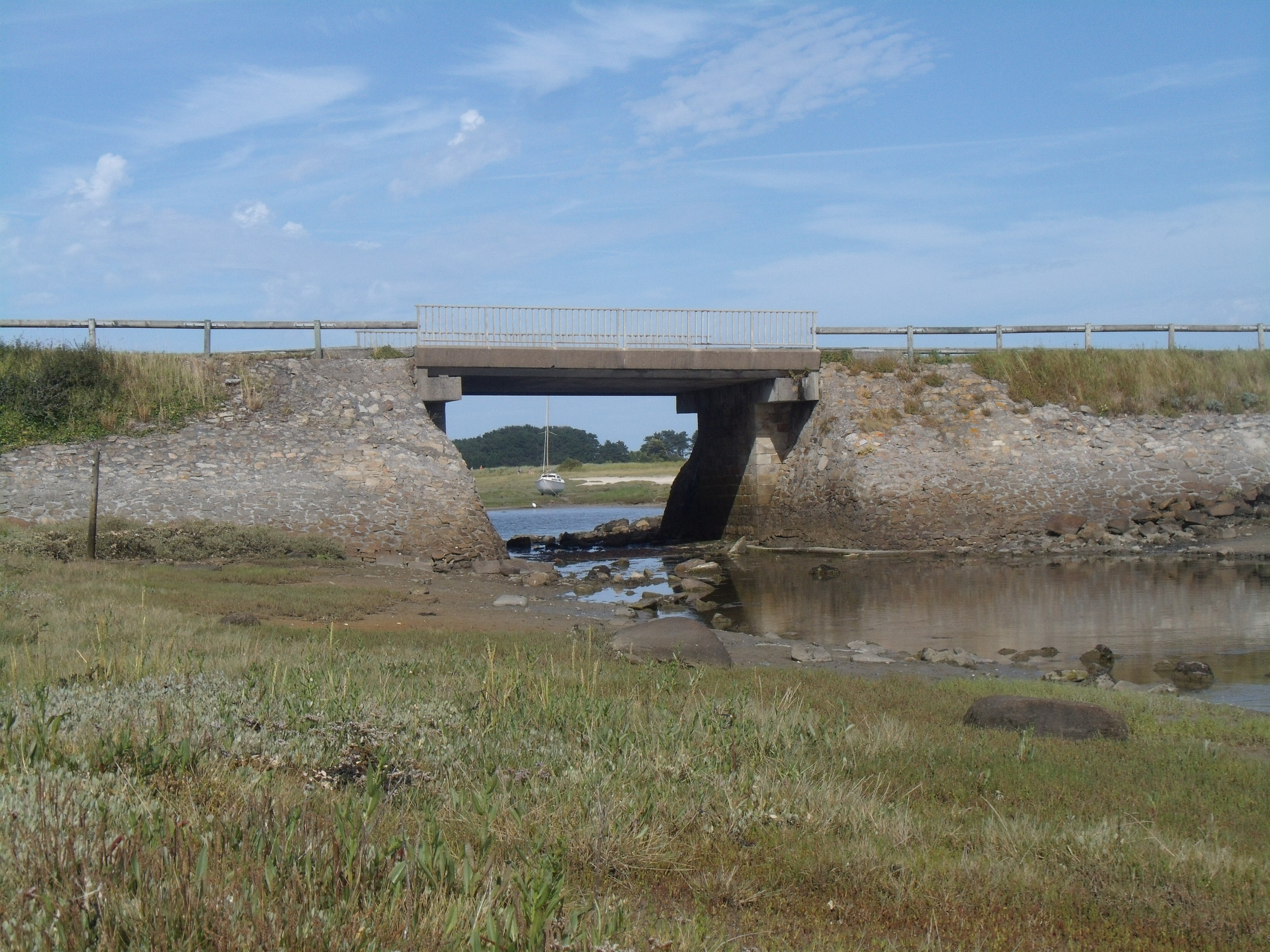 Le pont de l'Île-Grande.